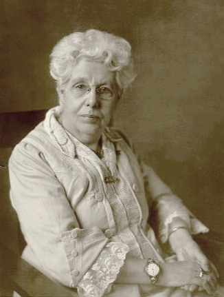 Annie Besant (1847-1933) in Sydney, Australien 1922